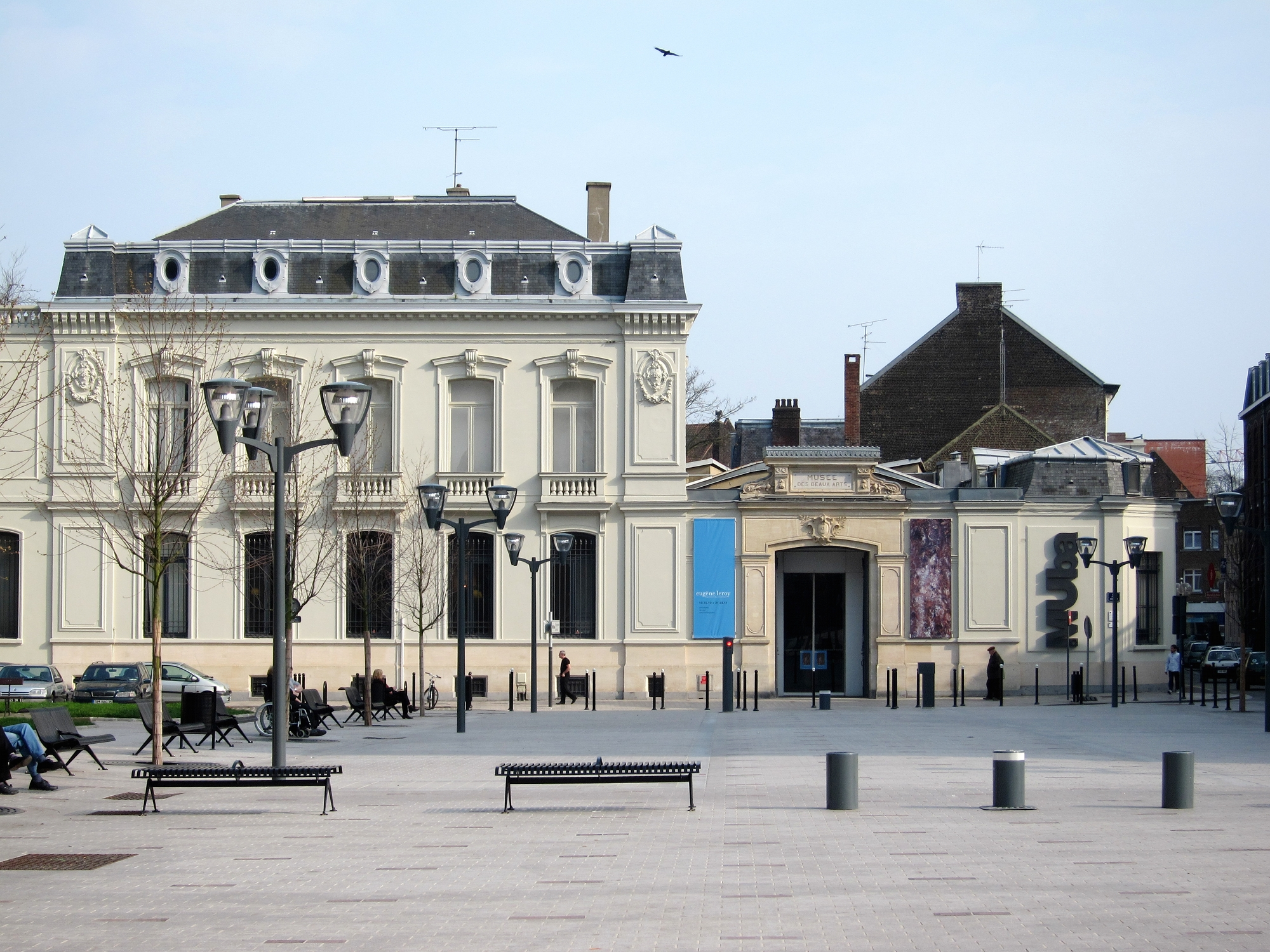 L'entrée du MUba Eugène Leroy à Tourcoing (Nord).